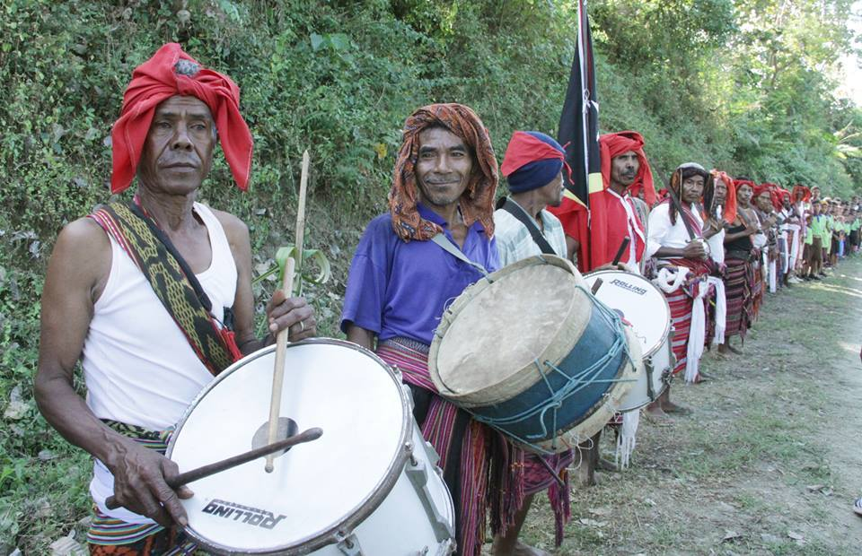 Moradores